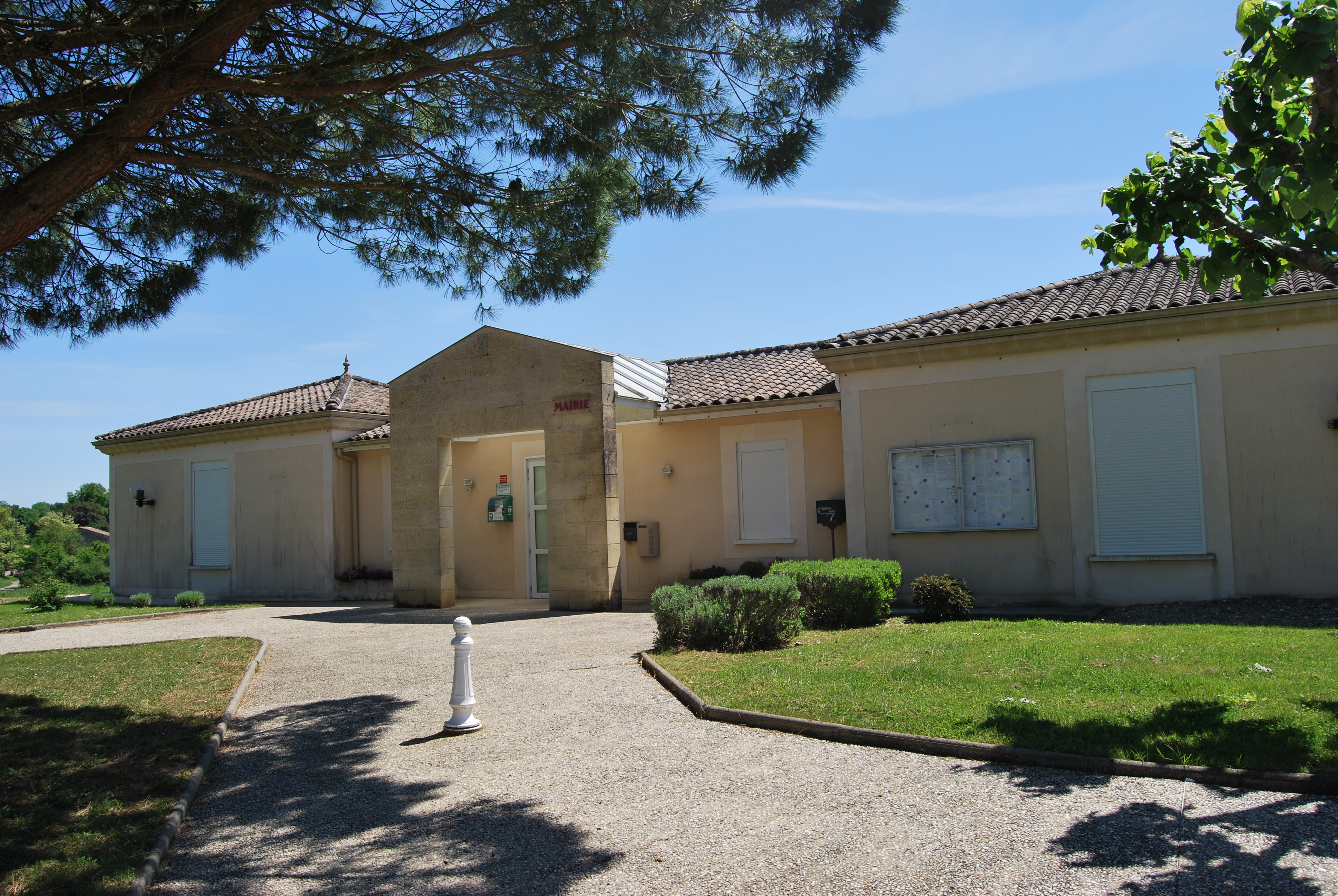 Mairie Baron